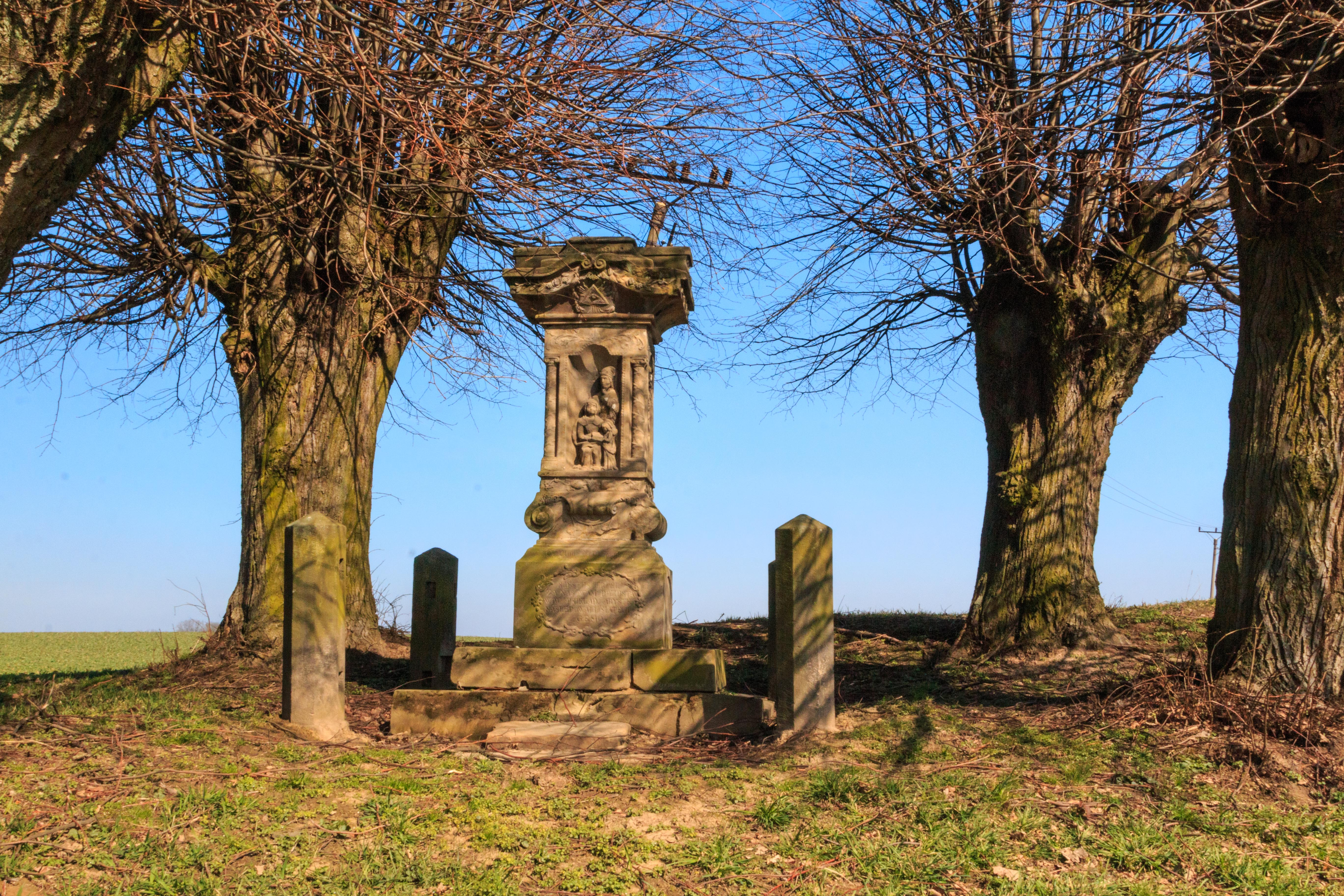 Kříž u silnice ze Zelenecké Lhoty do Skuřiny